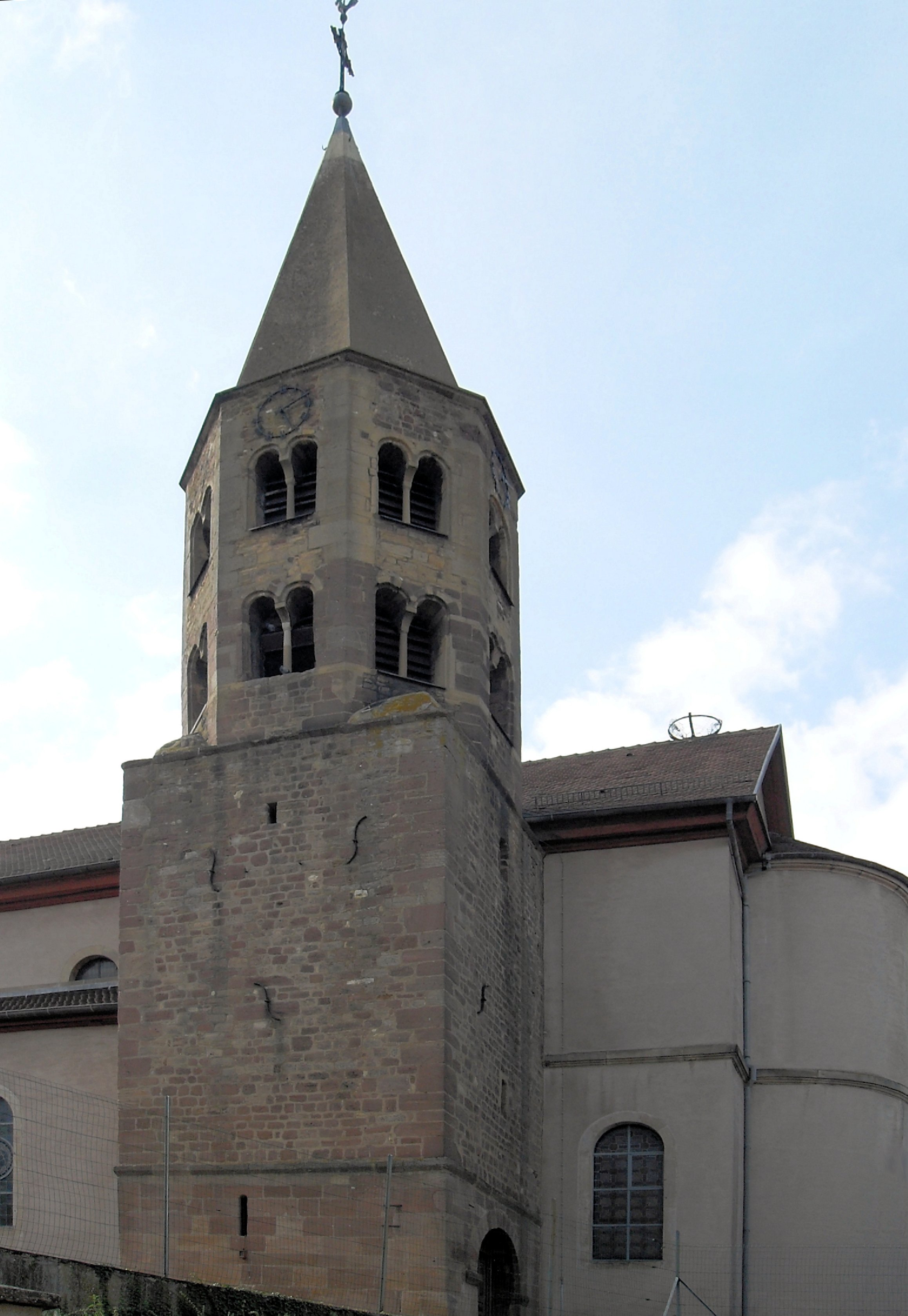 L'église Sainte-Agathe à Gundolsheim